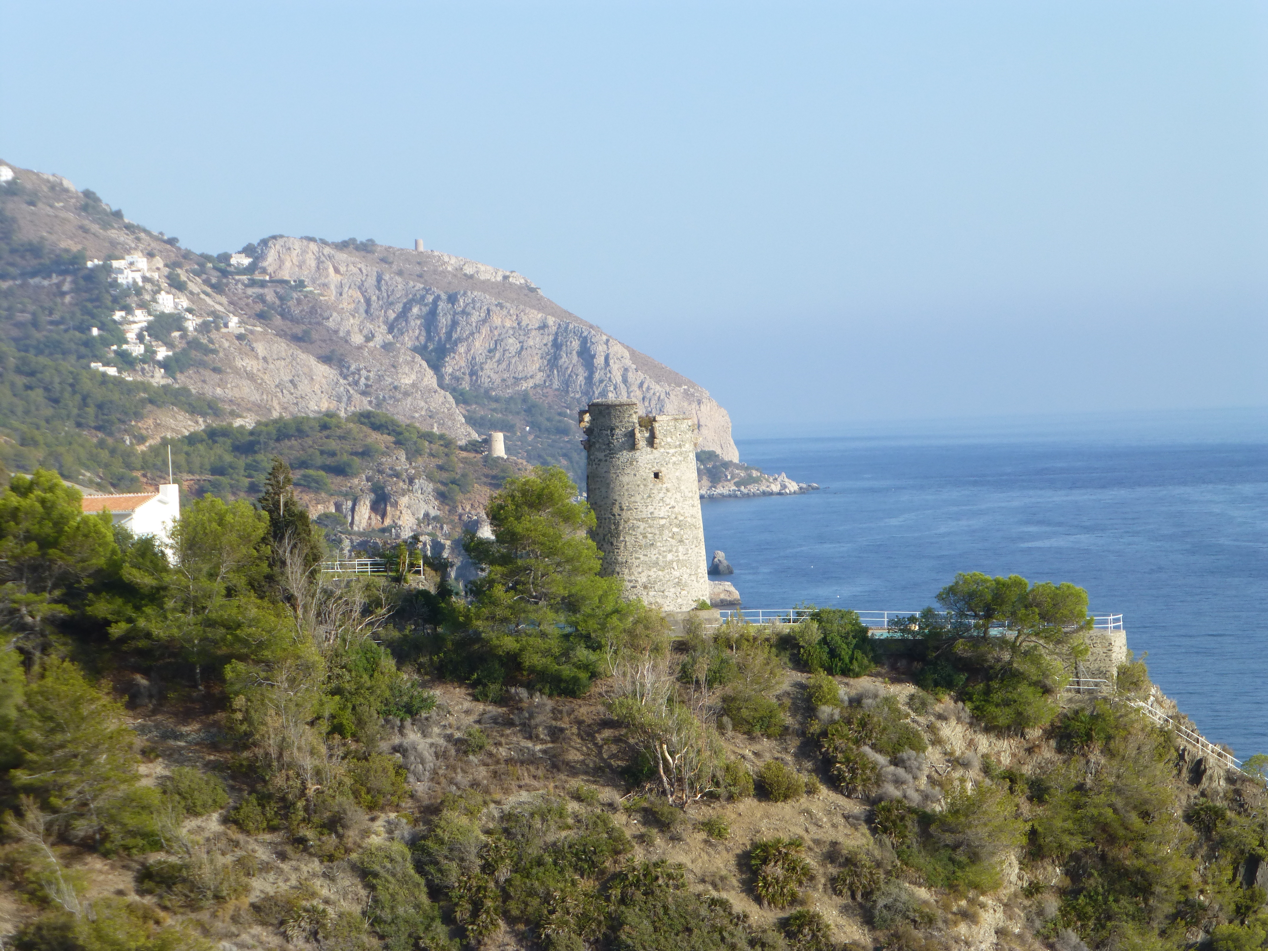 Torre del Pino, Nerja, Málaga, Andalucía, España. En segundo plano, la torre de Caleta. Al fondo, la torre de Cerro Gordo.